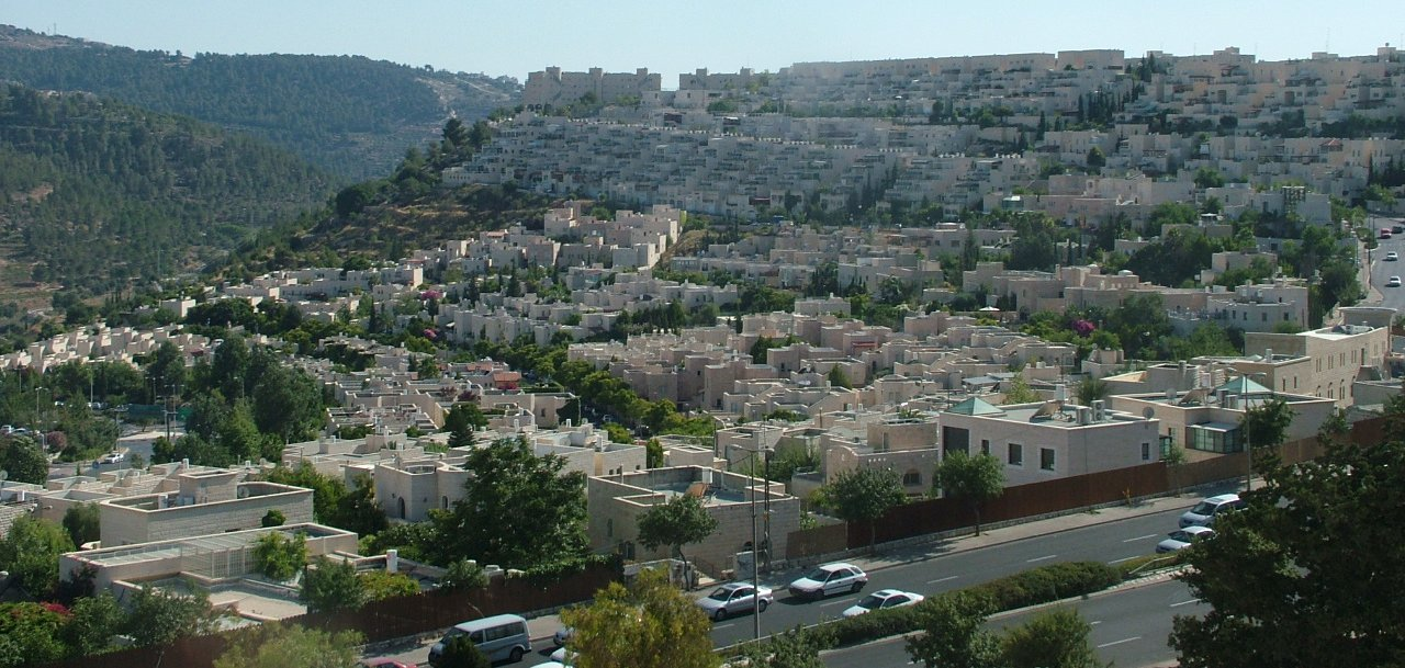 Malha, Jerusalem, Israel